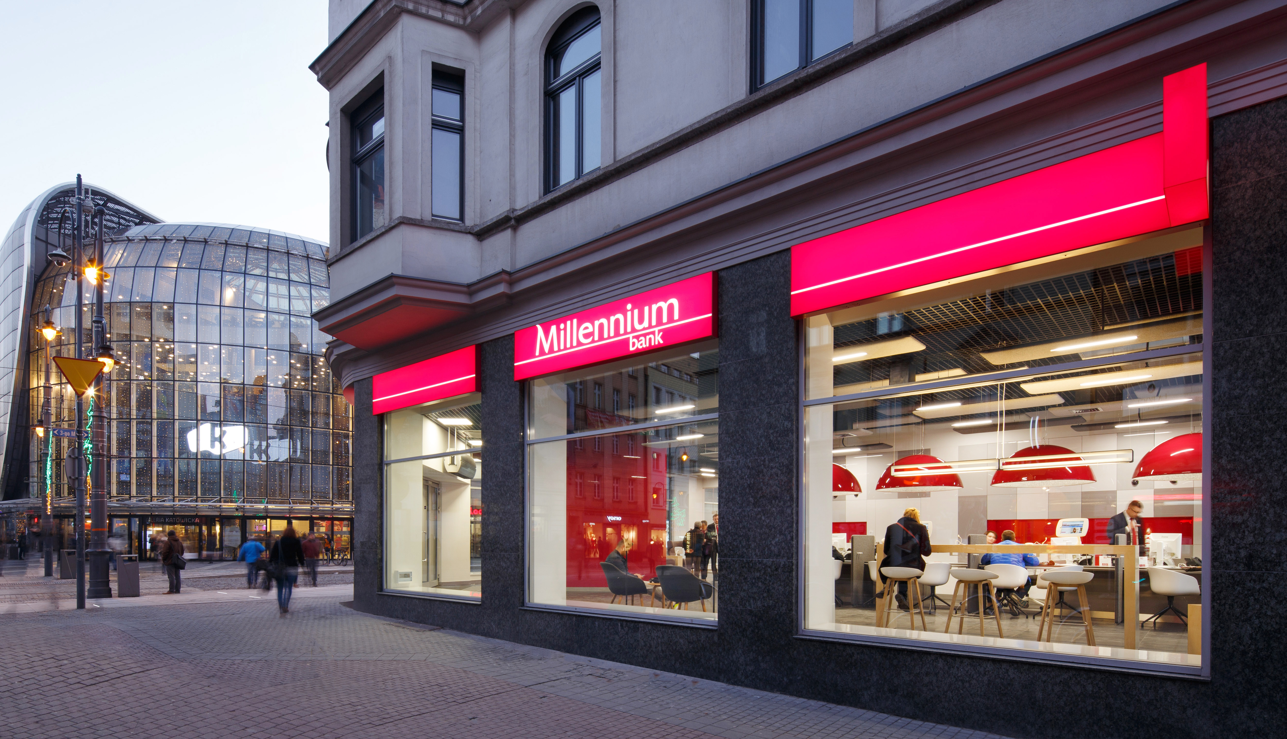 Placowka Banku Millennium w Katowicach widok z zewnatrz